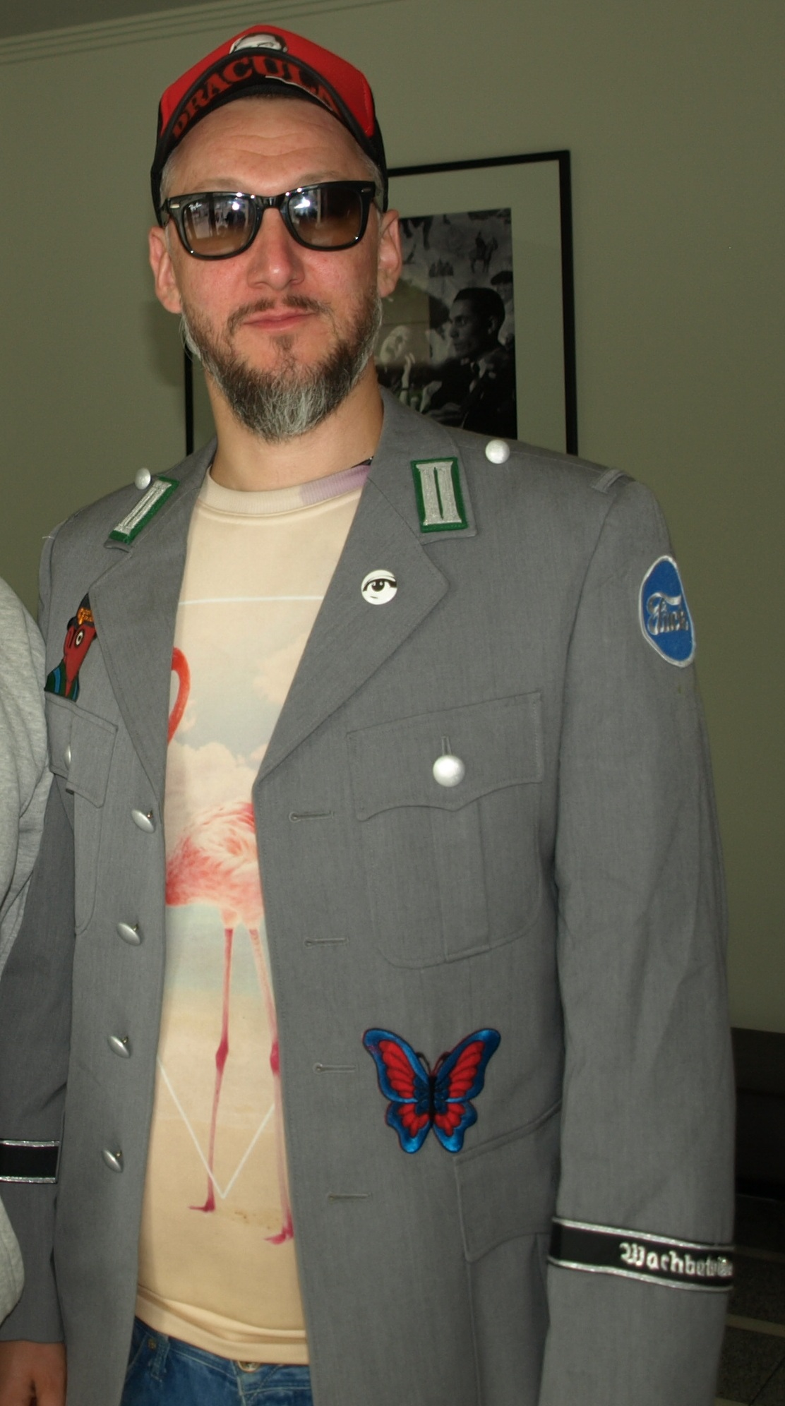 Bodo Kox